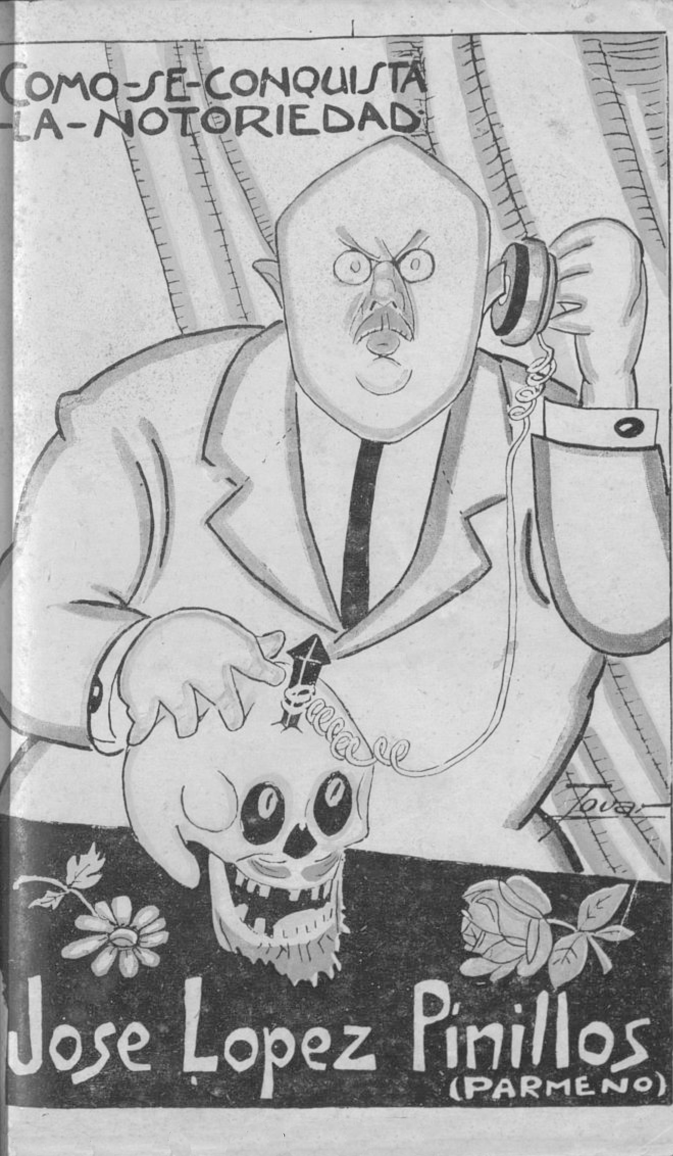 Cómo se conquista la notoriedad, los favoritos de la multitud.